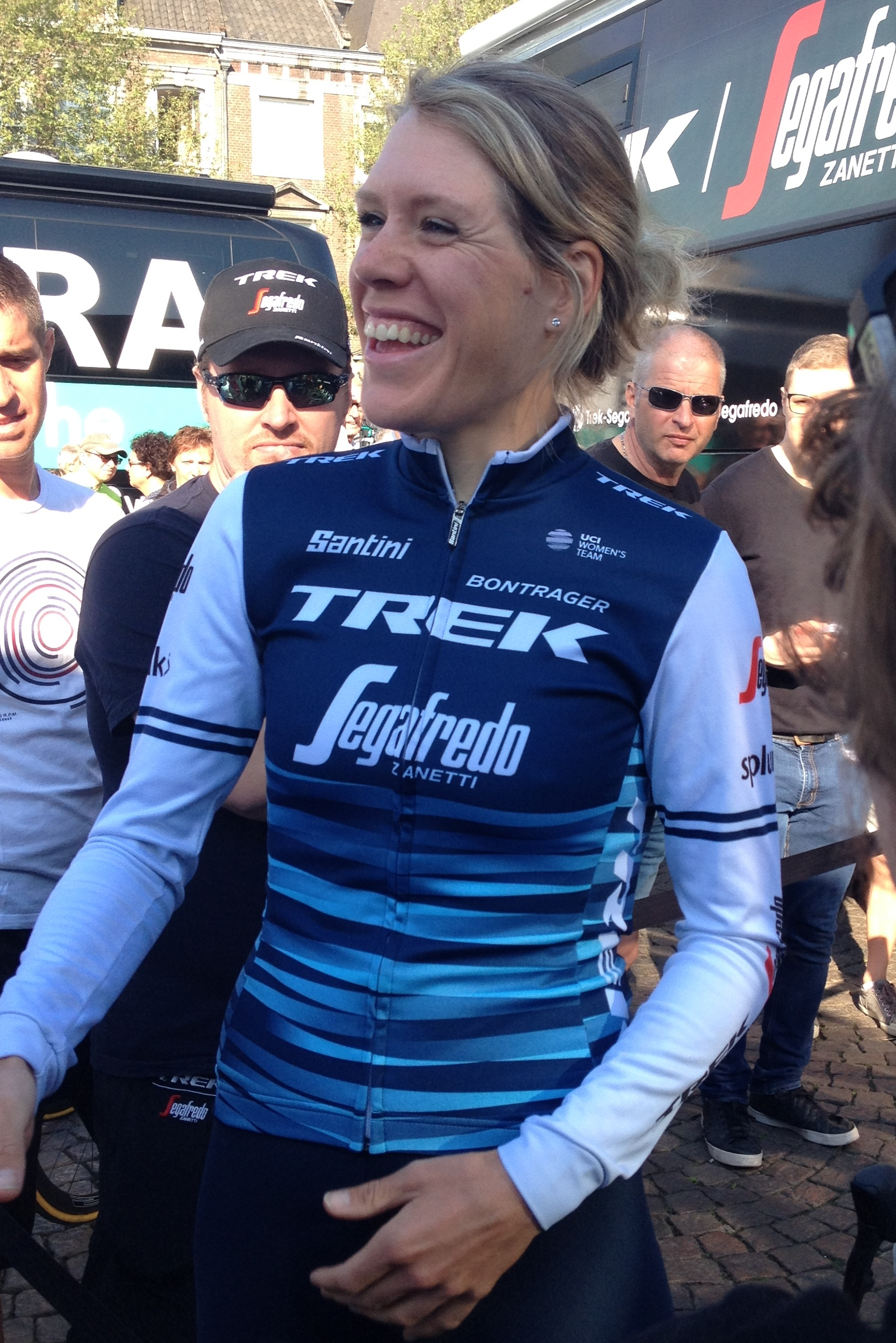 Start van de Amstel Gold Race Ladies Edition 2019 in Maastricht